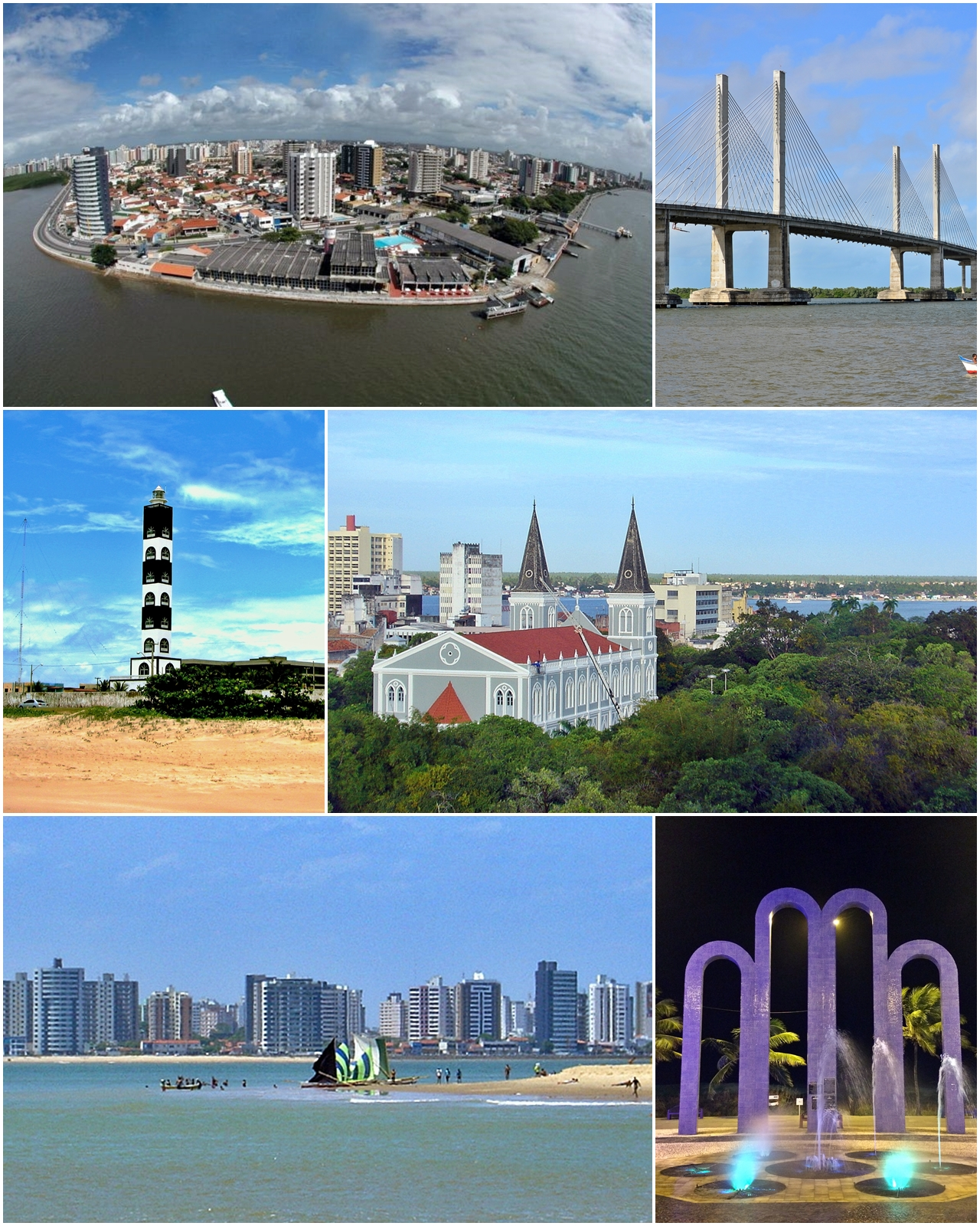 Montagem de Aracaju.